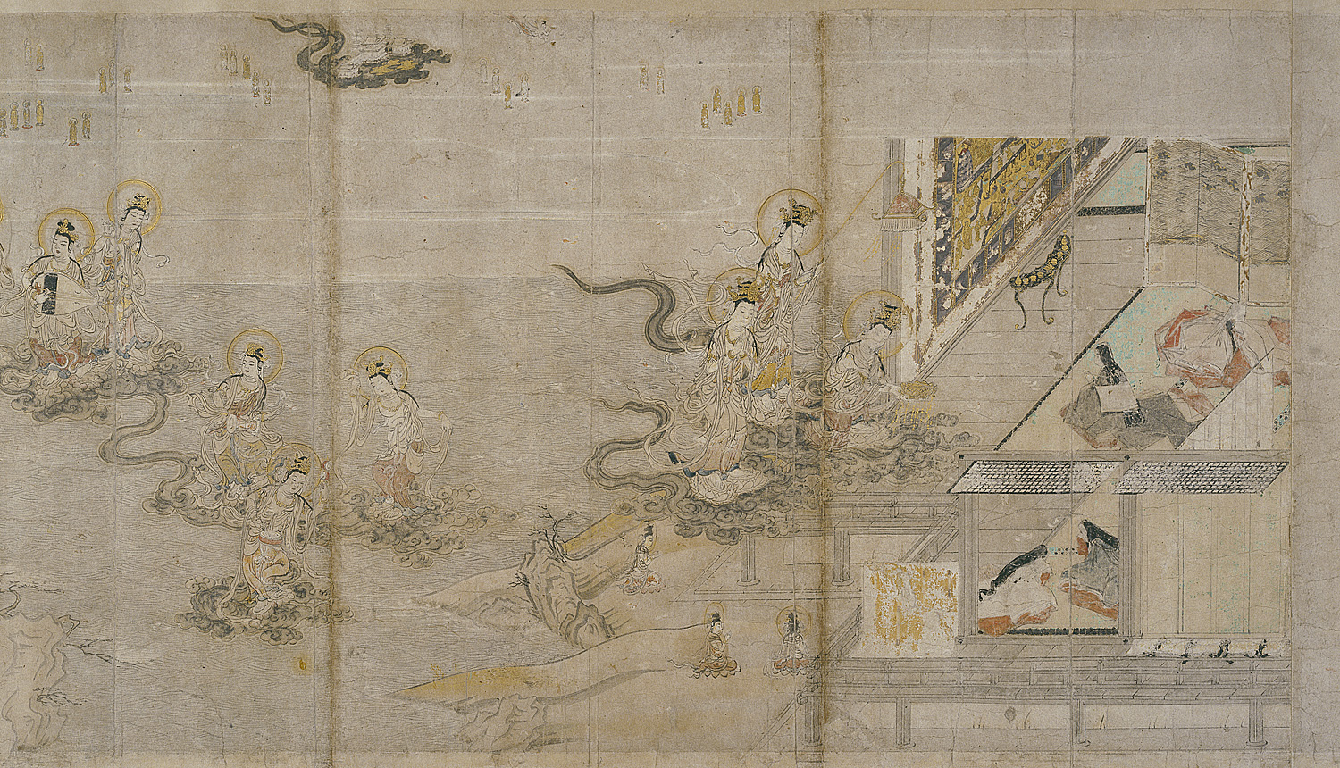 Mort de la princesse Chujo-hime, qui va renaître dans le paradis d'Amida.